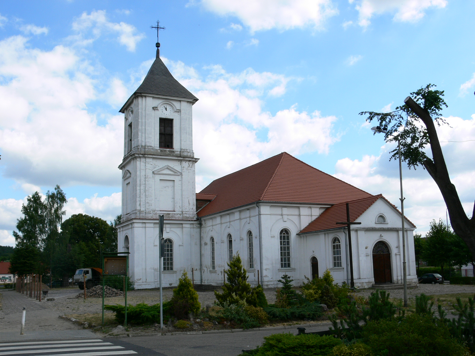 Kalisz Pomorski - Kościół pw Matki Boskiej Królowej Polski